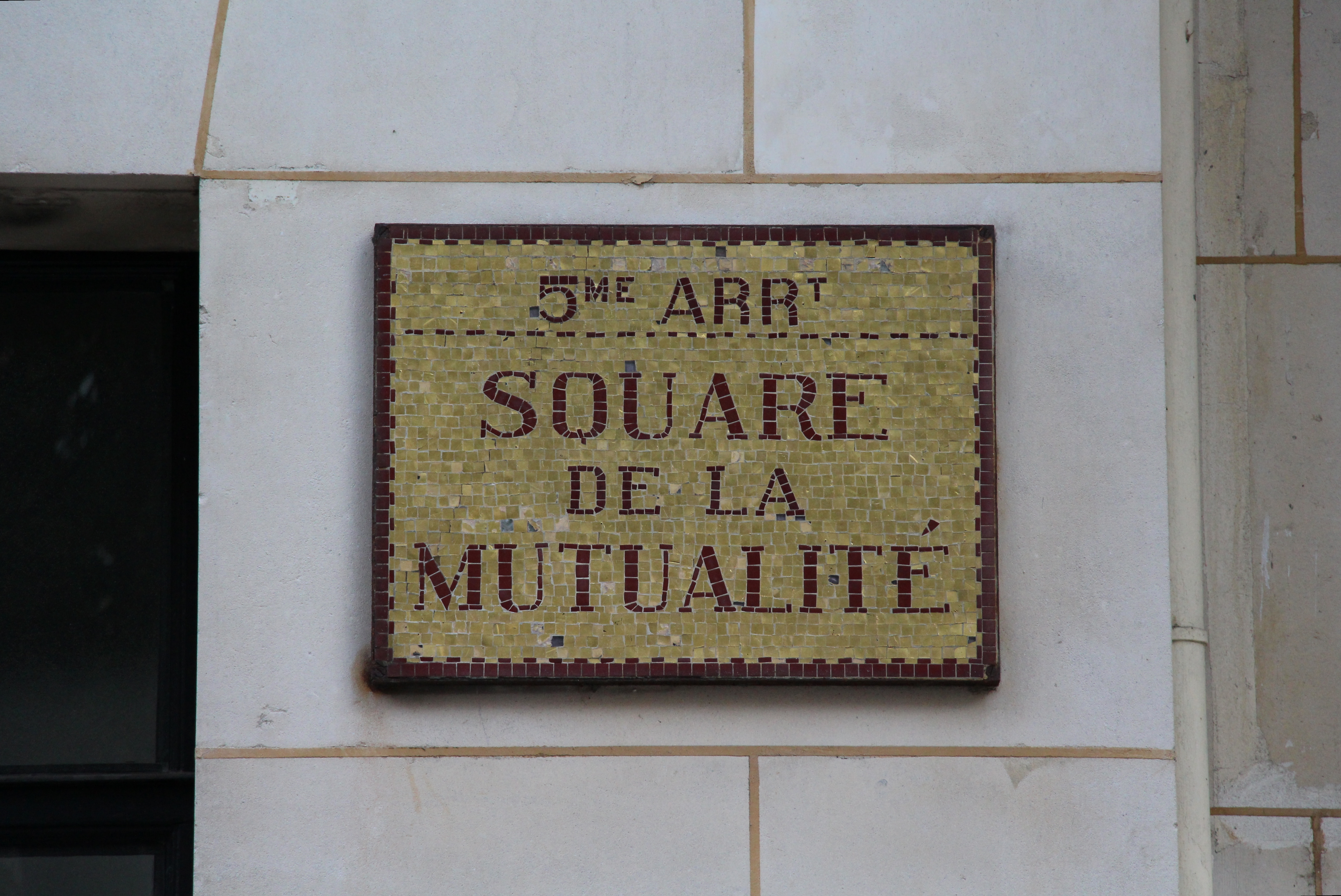 (Saint-Victor) Square de la Mutualité Original street signboard on the Maison de la Mutualité.